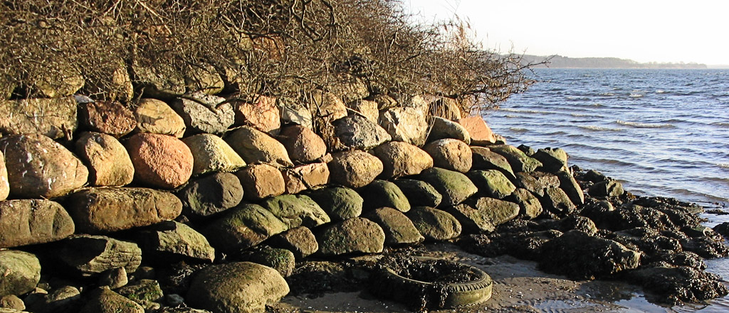 Beschreibung: Steinbefestigung der Küste Dänholms Fotograf: Darkone, 15. Dezember 2004